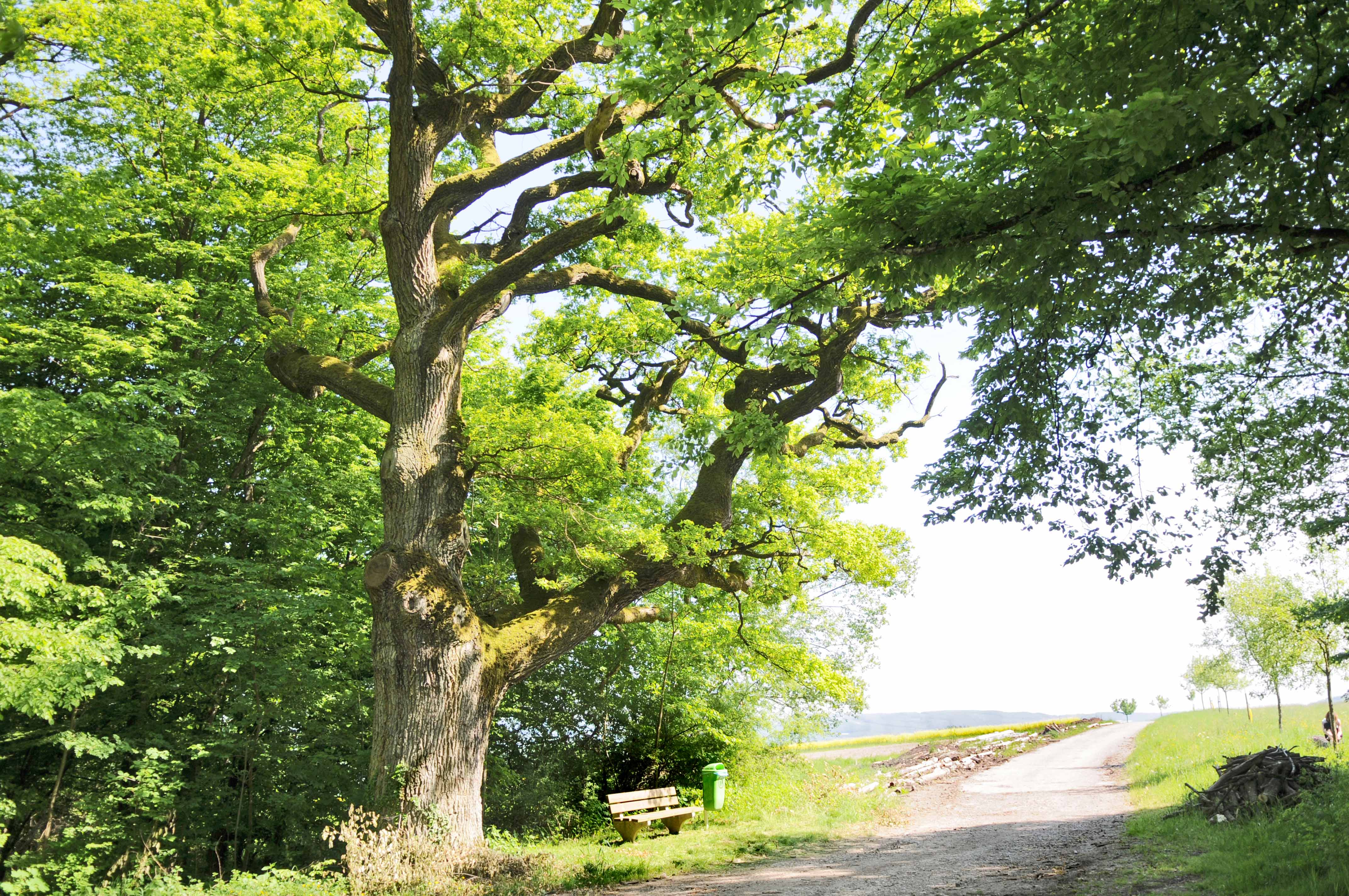 Bemærkelsesværdigt træ i Storhertugdømmet Luxembourg